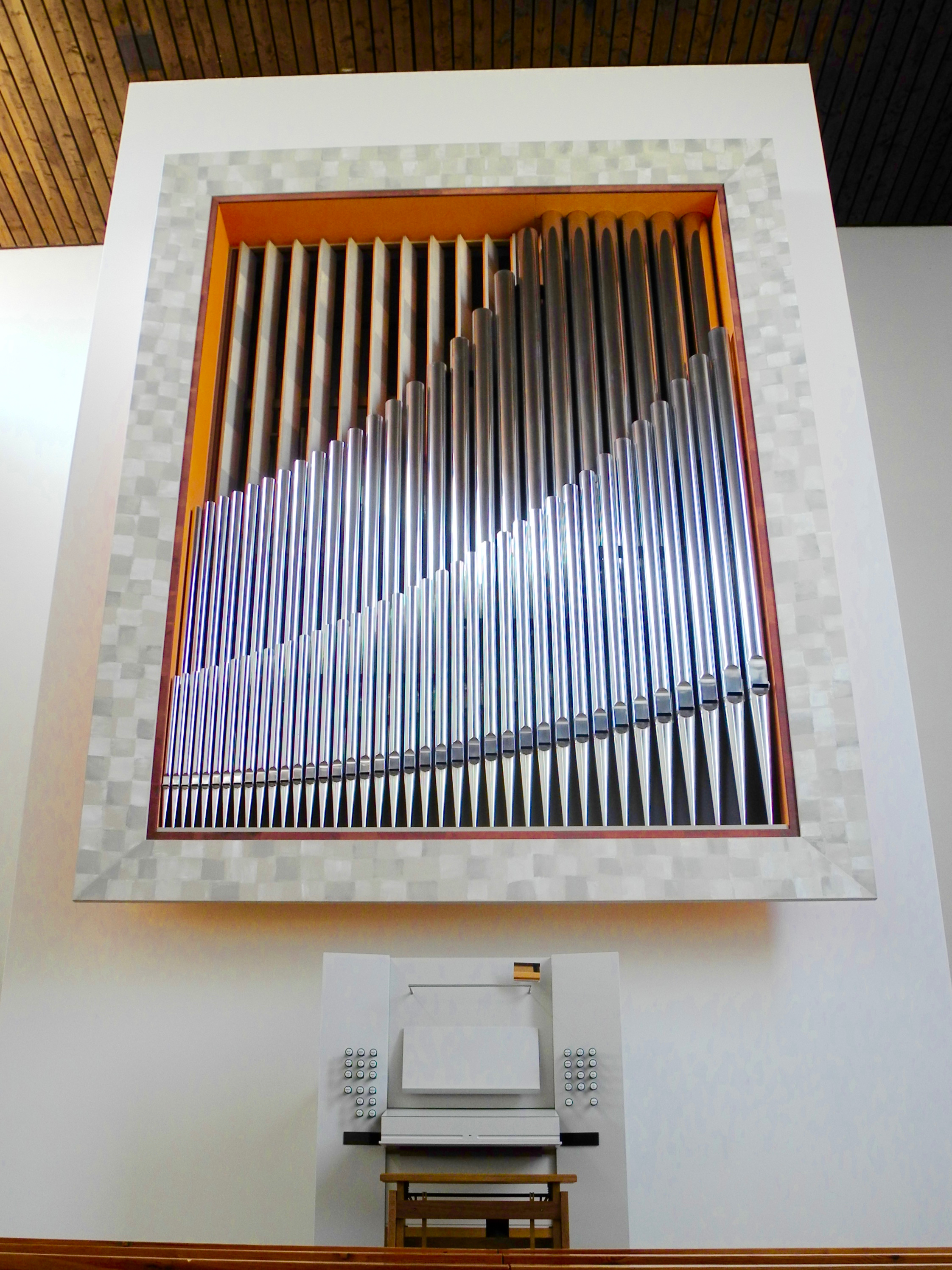 2012 Winterhalter (II-P-24)